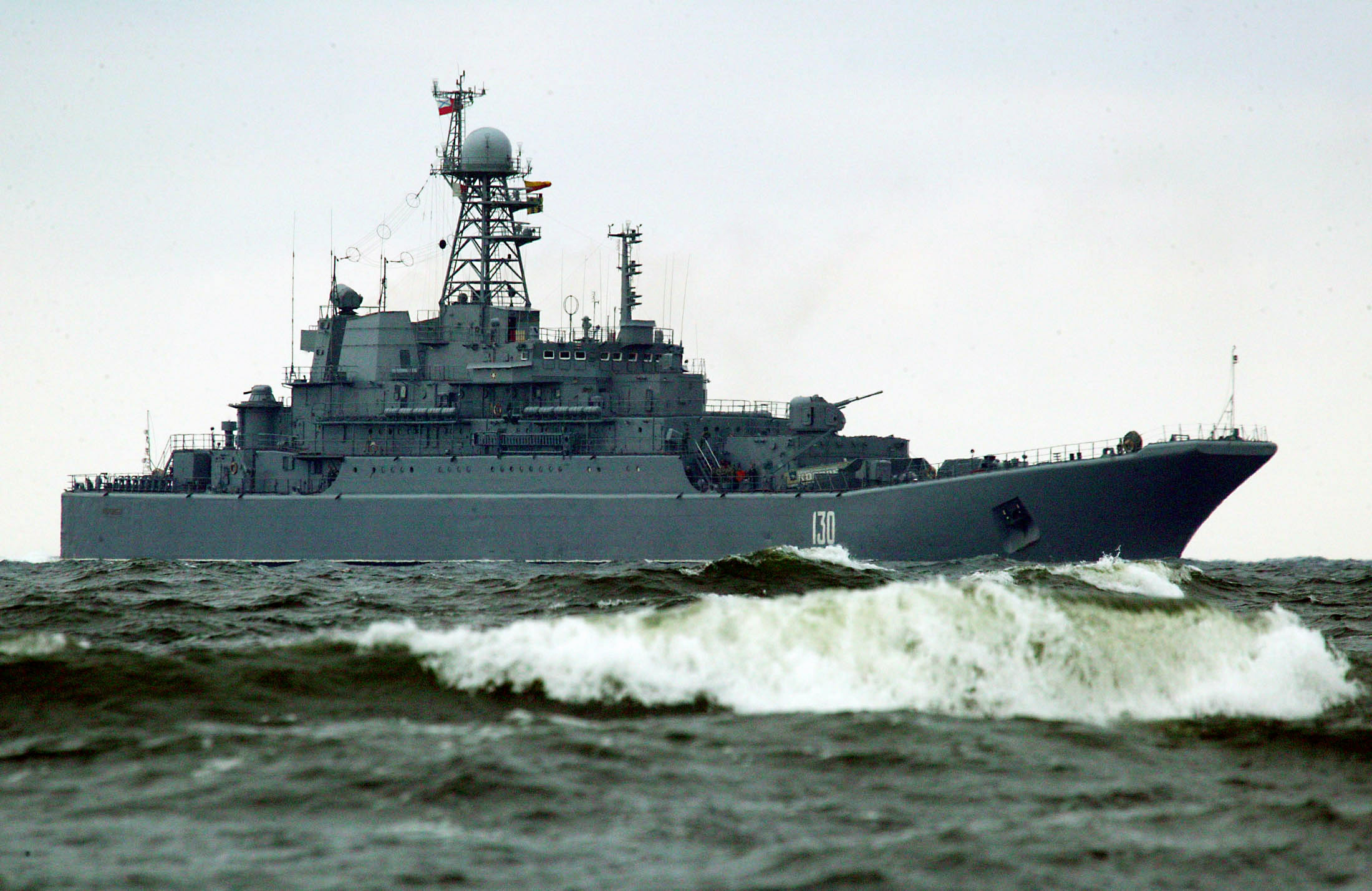 БДК «Королёв» в море